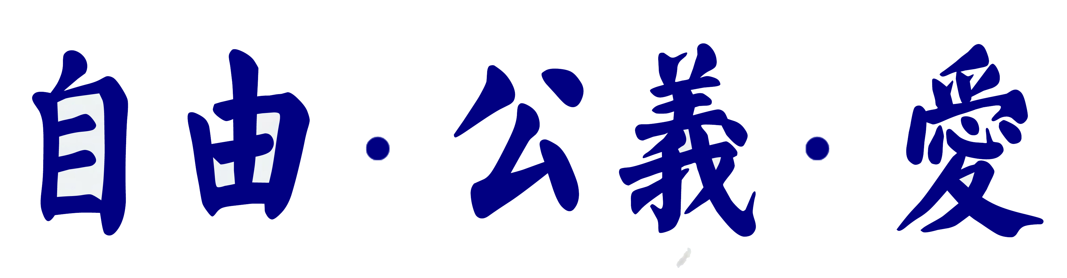 中文（中国大陆）: 自由公義愛标识